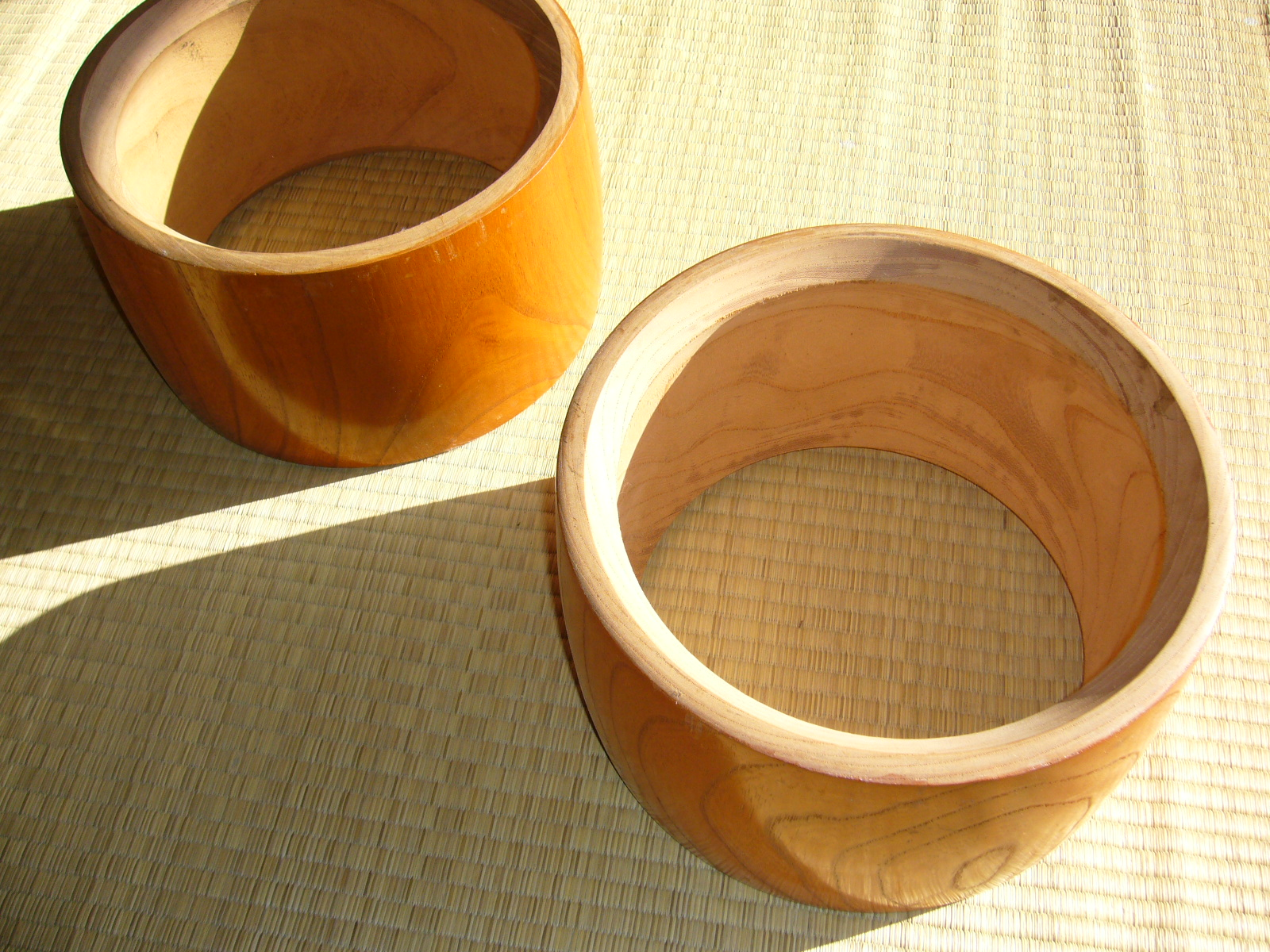 shell,japanese small drum,dou,tsuke-daiko,katori-city,japan